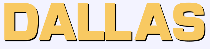 Dallas series logo